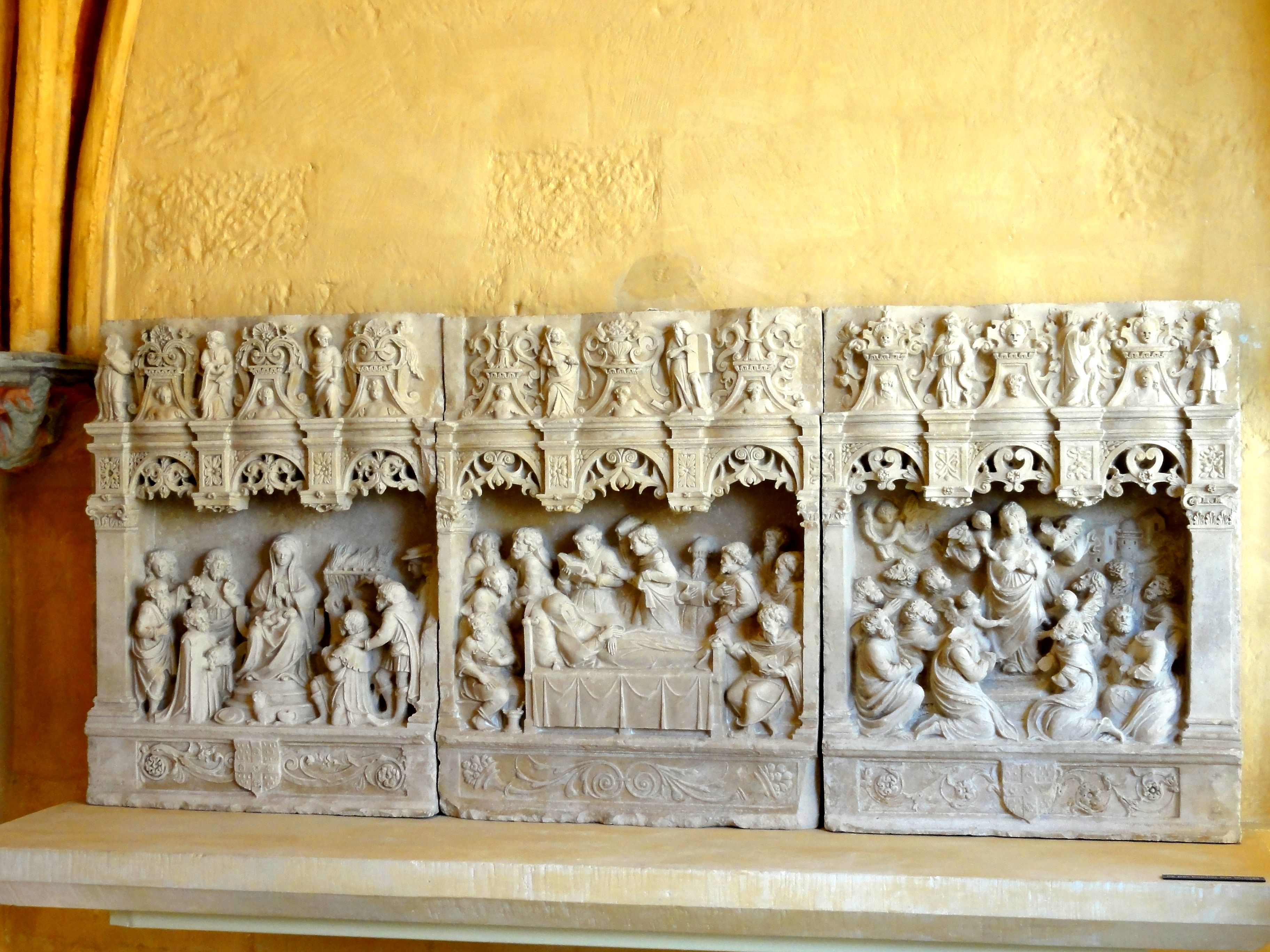 Retable de la Vierge, datant de 1520 / 1540, provenant du prieuré Saint-Arnoul de Crépy-en-Valois.